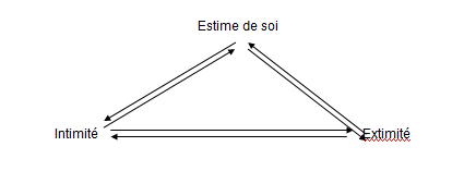 Extimité